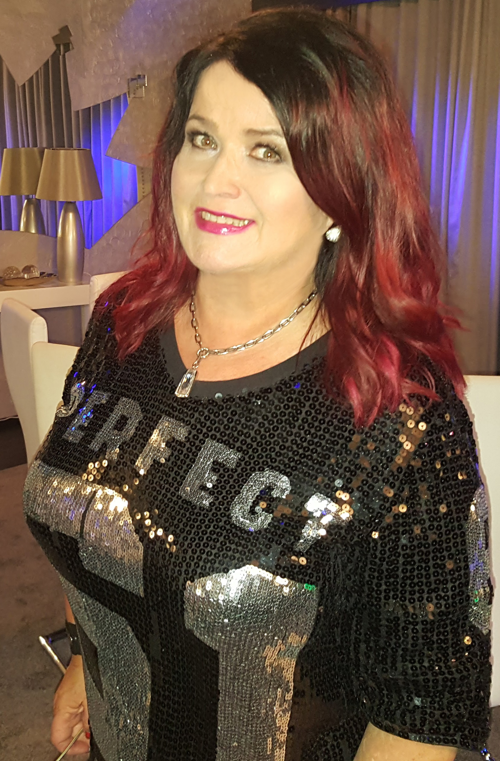 Meiju Keikalla 2017